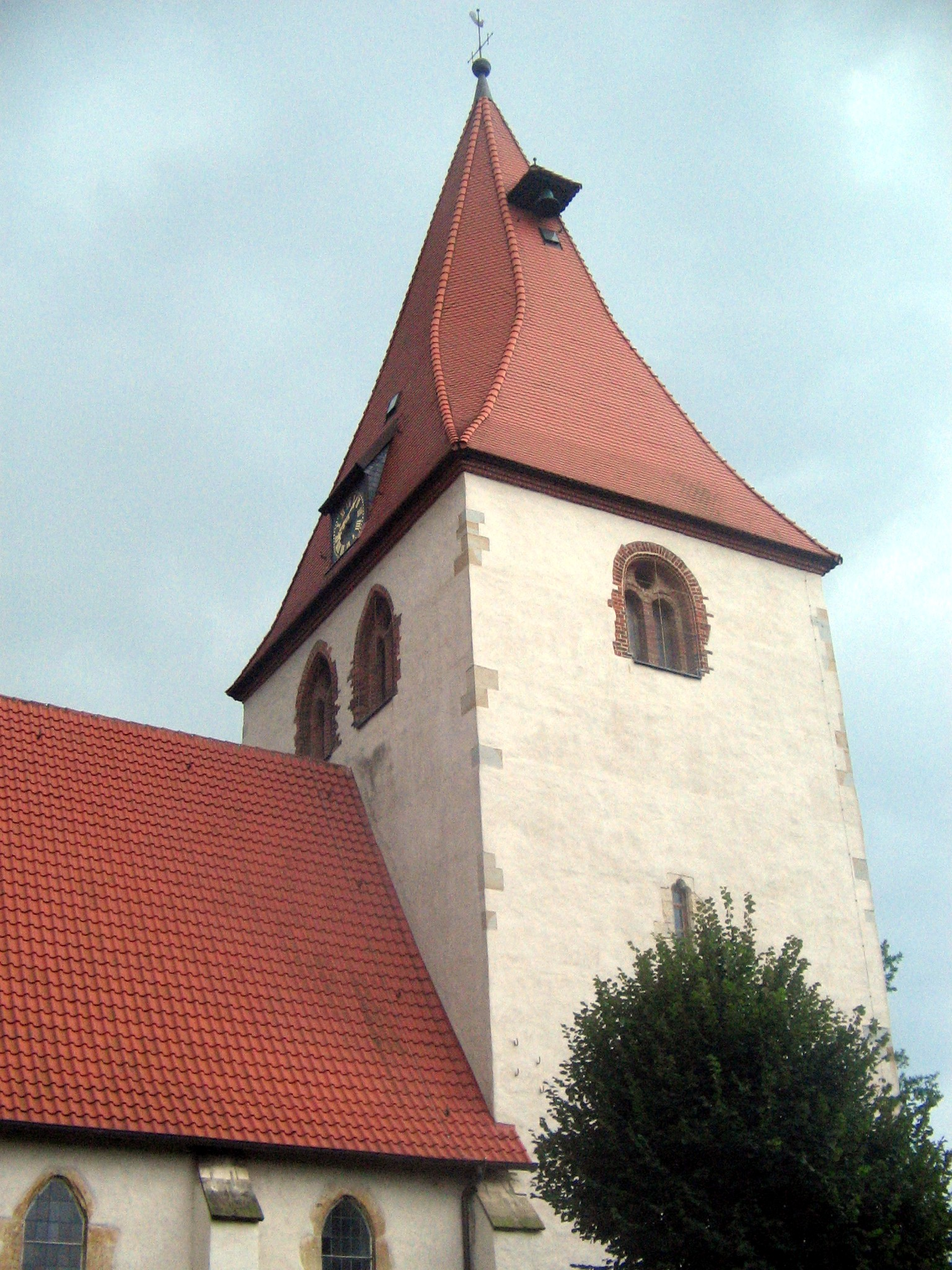 Marienkirche in Isernhagen KB